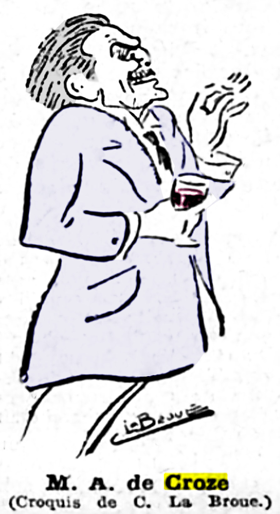 rare portrait d'Austin de Croze